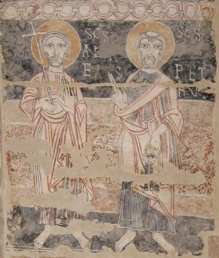 Fresques de Vals (Ariège - début du XIIe siècle). Saint André et Saint Pierre.